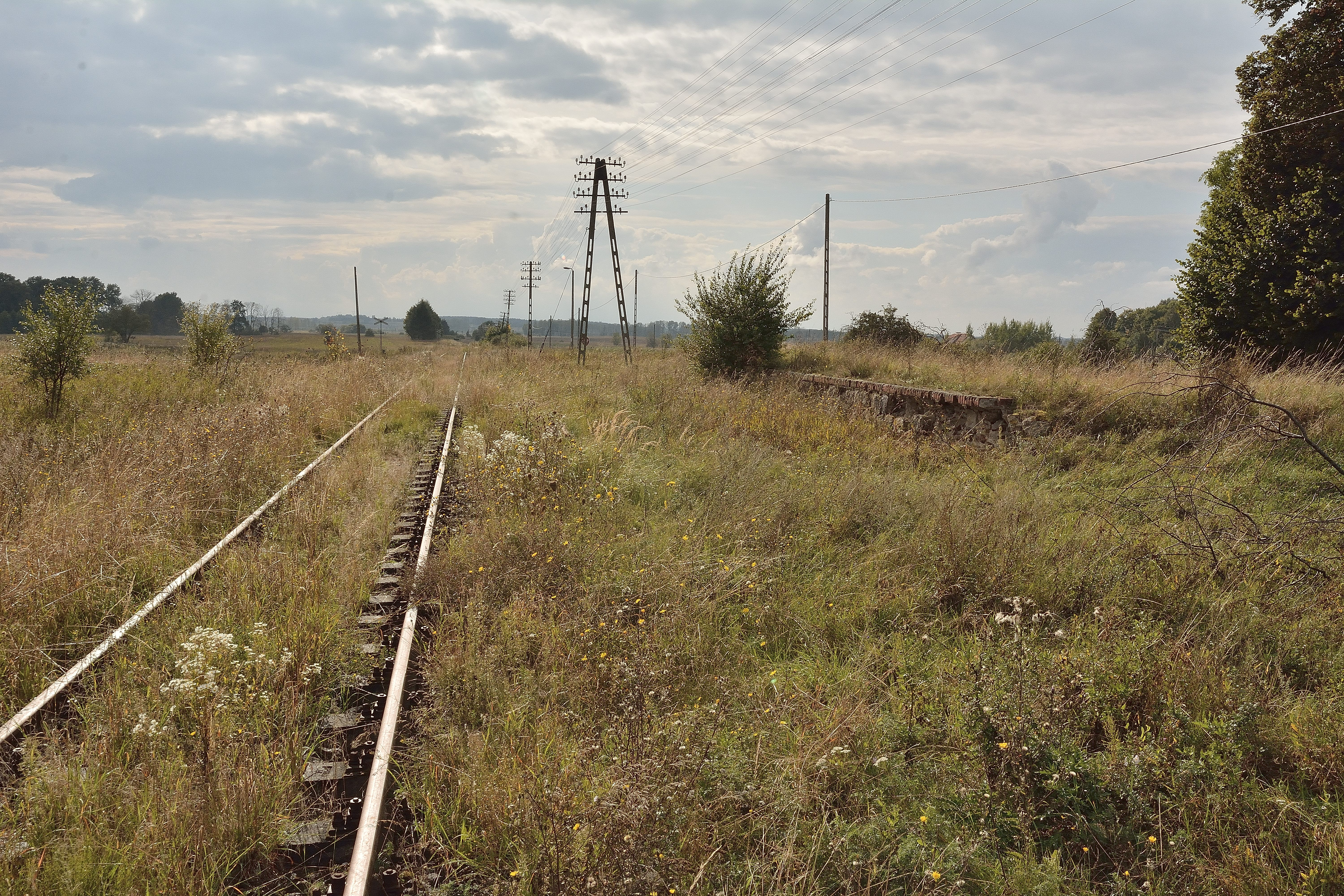 pozostałości poniemieckiego peronu nieczynnej stacji w Woźnicach na linii kolejowej 223